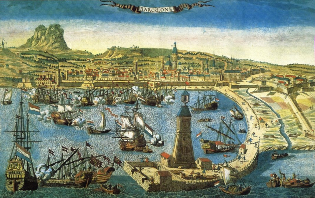 Puerto de Barcelona, grabado francés del siglo XVIII.